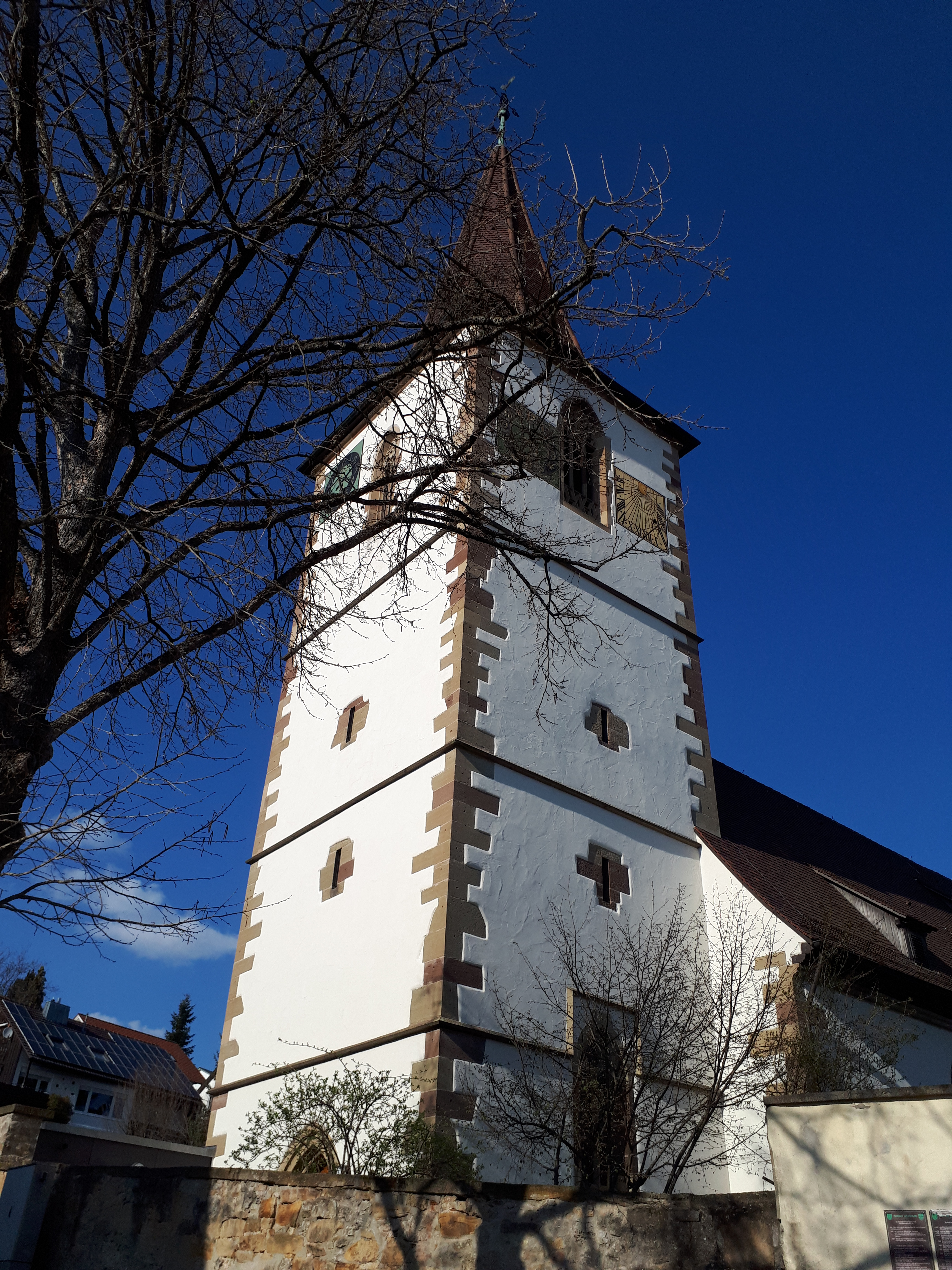 Turm der Margaretenkirche in Aldingen (Remseck)